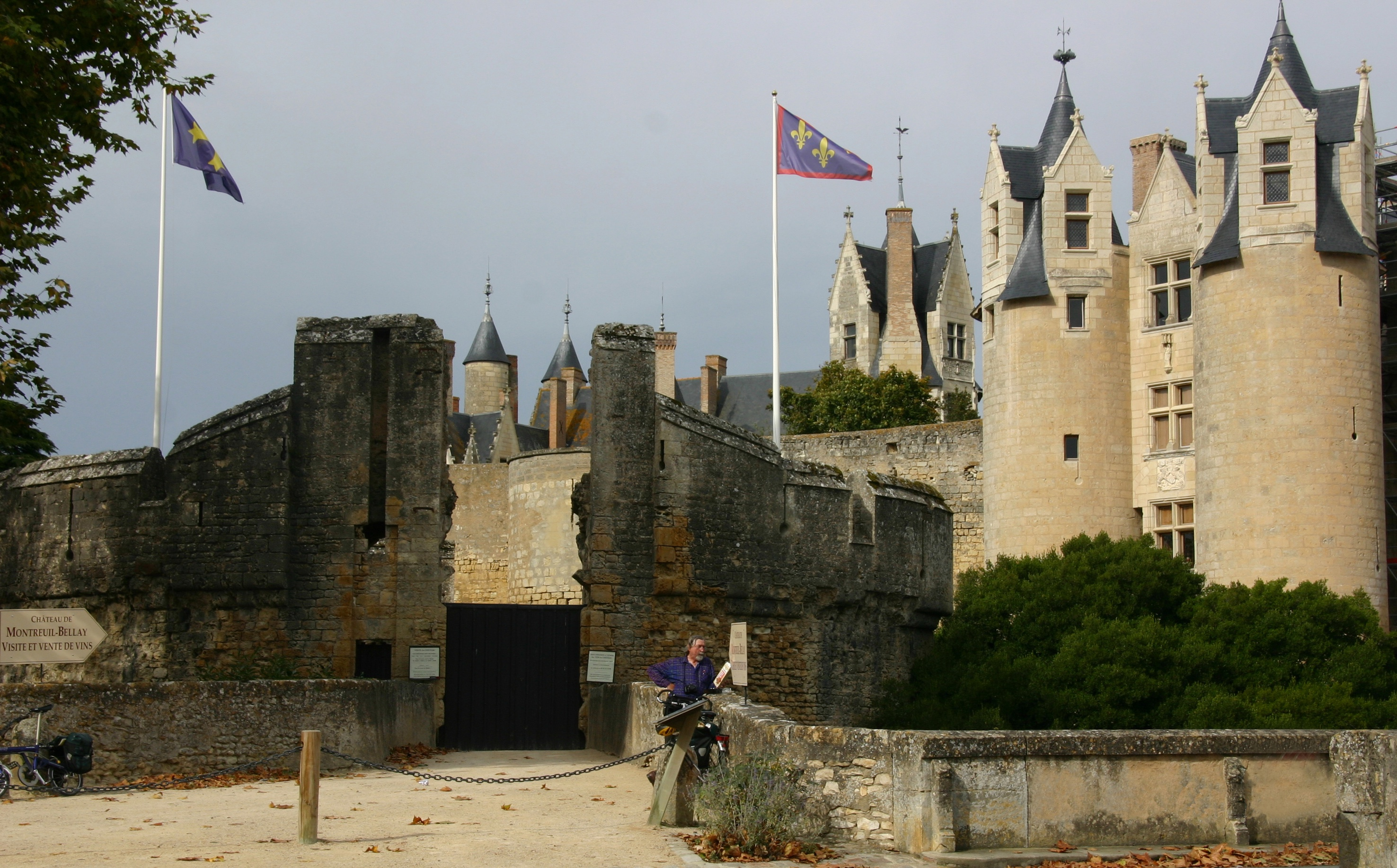 Schloss Montreuil-Bellay